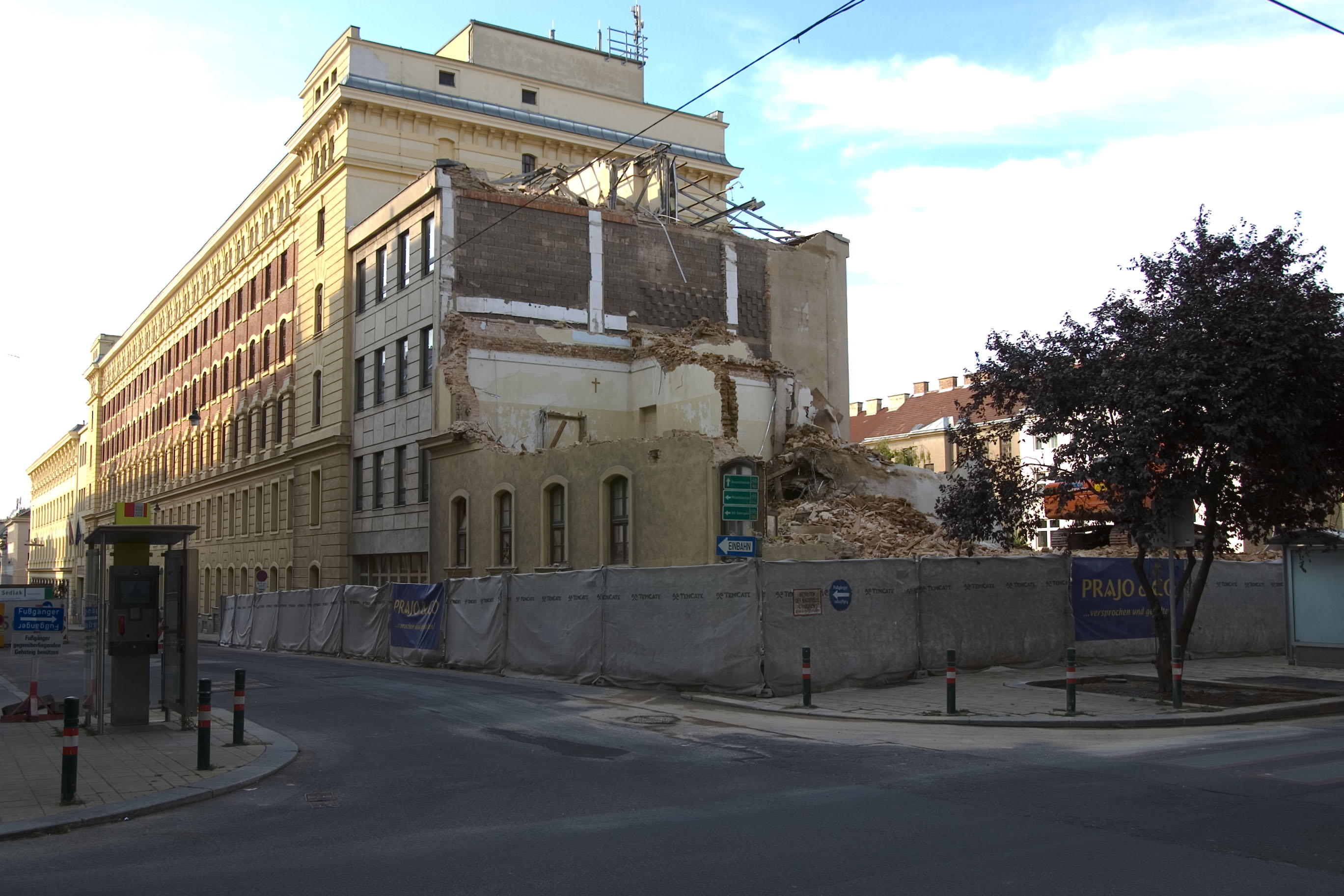 Blick auf das B-Gebäude der HTBLVA Spengergasse nach dem Abbruch des C-Gebäudes.